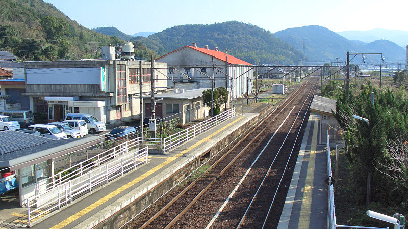 肥薩おれんじ鉄道線湯浦駅 ホーム 写真奥が川内駅方面。 撮影者/著者/著作権保有者 : MK Products (本人がアップロード) 撮影日 : 2006/12/19 湯浦駅用にアップロードした画像です。良い画像があれば別の画像に変えてください。